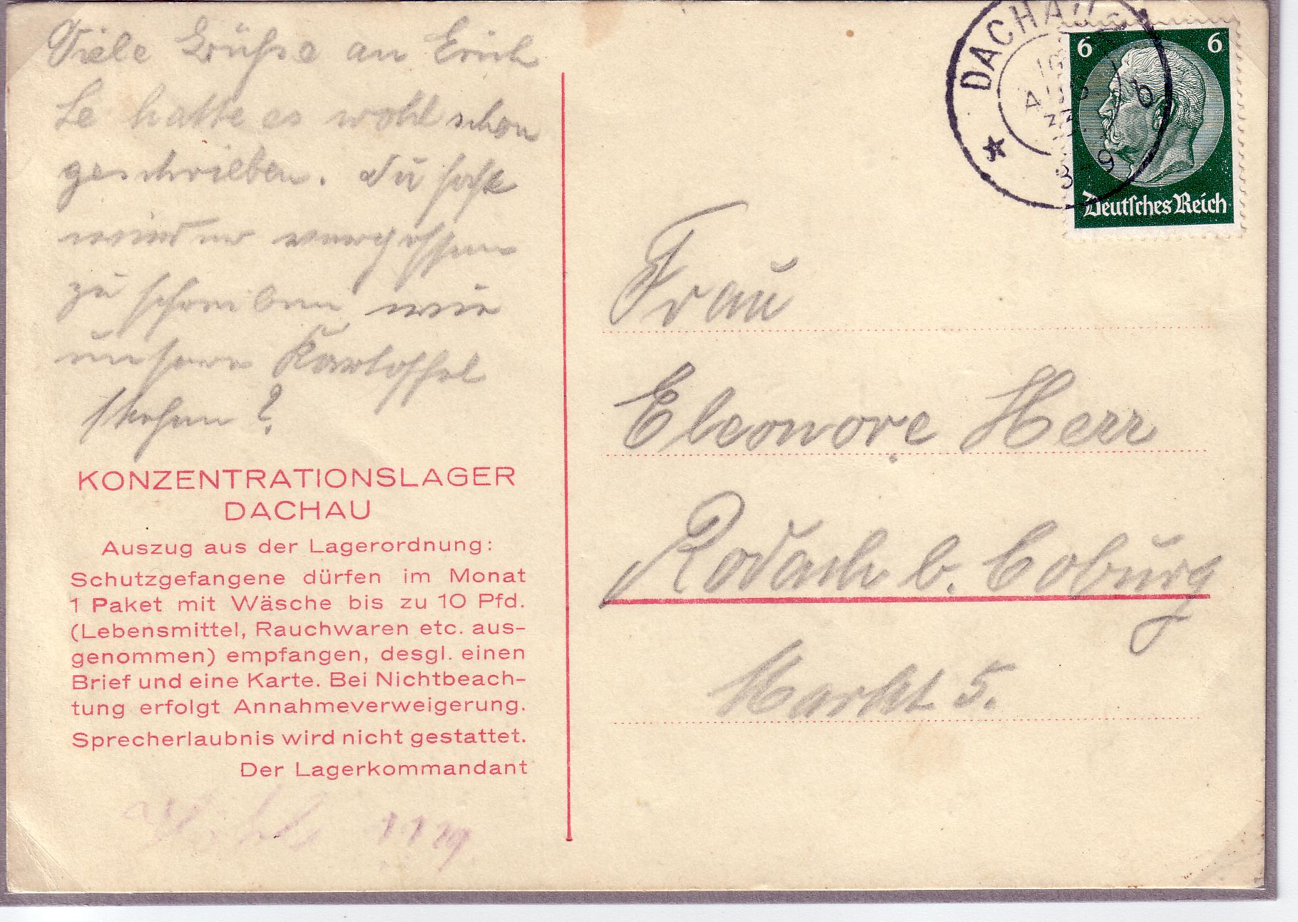 Häftlingspostkarte eines Häftlings aus dem KZ Dachau von 1933 * Poststempel: "Dachau, August 1933"